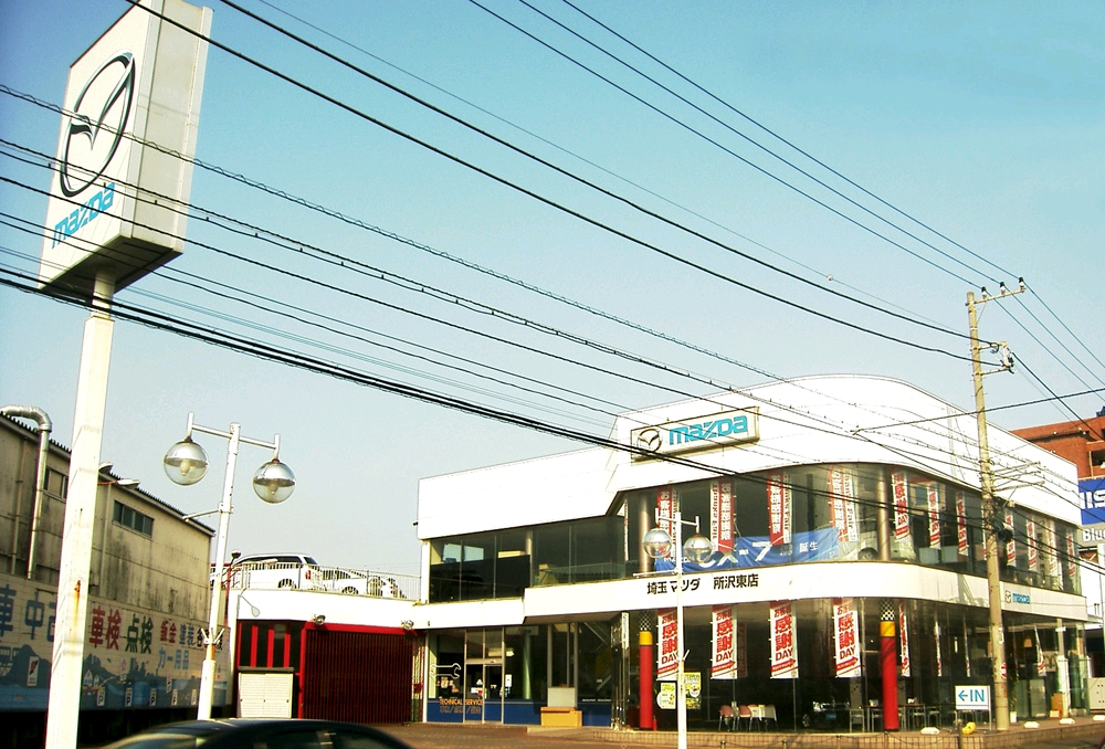 “Mazda_Car_dealership_Tokorozawa_Saitama”